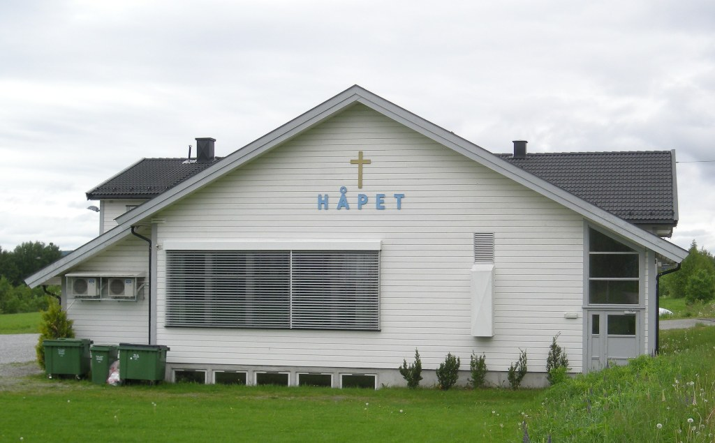 Pinsekirken Håpet Eidsvoll Verk